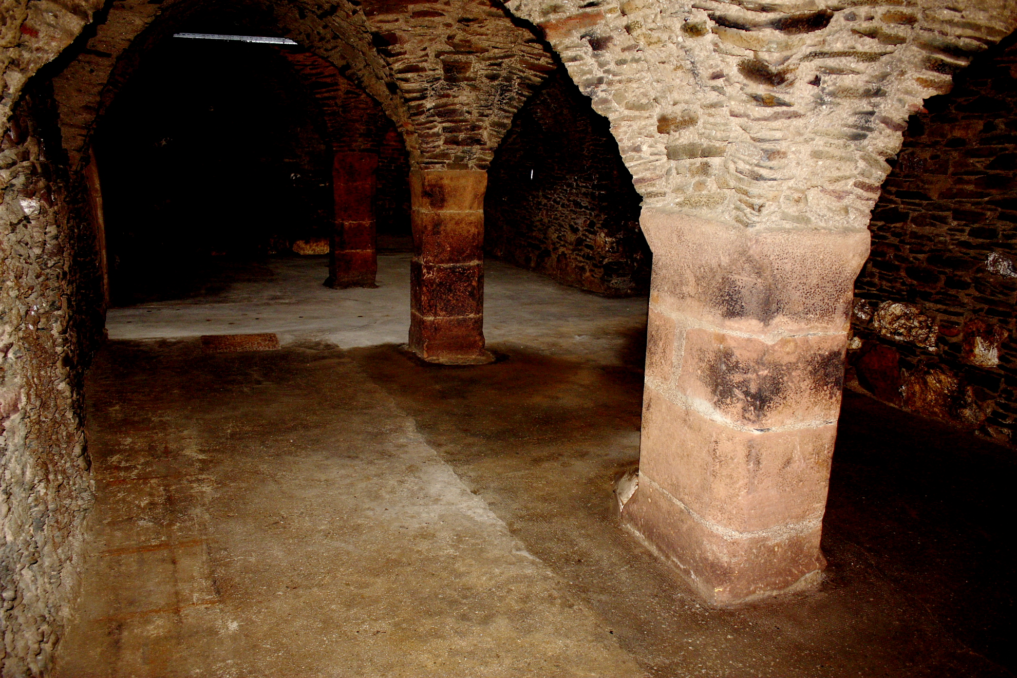 Innenansicht des historischen Loesnicher Burgkellers 2013. Entstehungszeit im 13./14. Jahrhundert